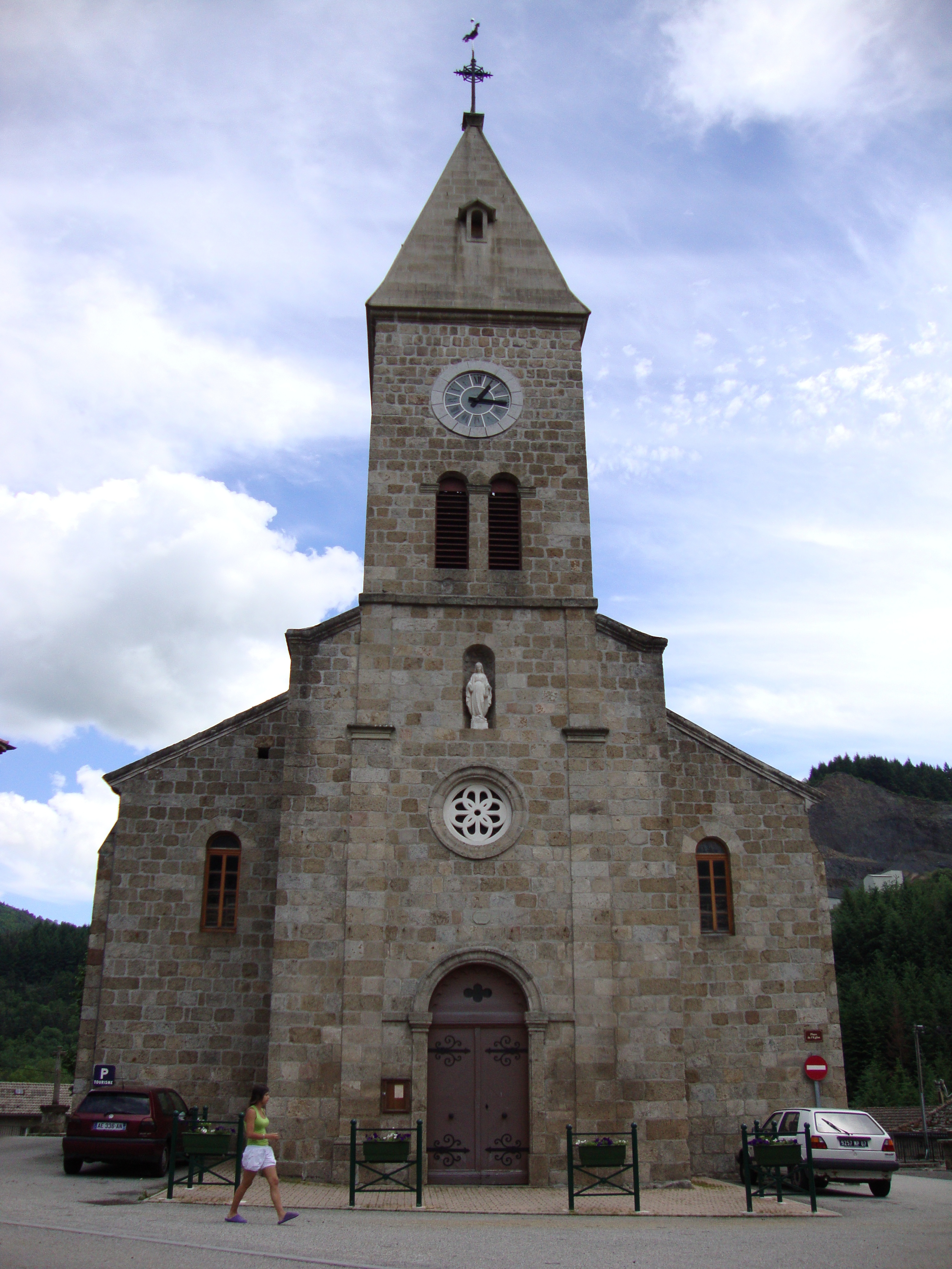 St.Julien-Boutières (Ardèche, Fr) church